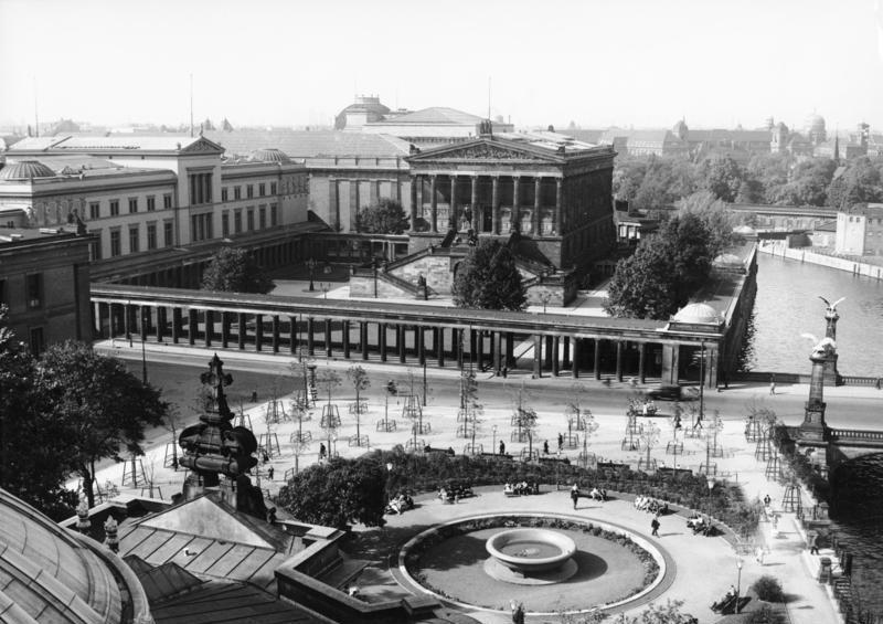 Berlin; Blick vom Dom auf Lustgarten, Neues Museum und Nationalgalerie um 1938